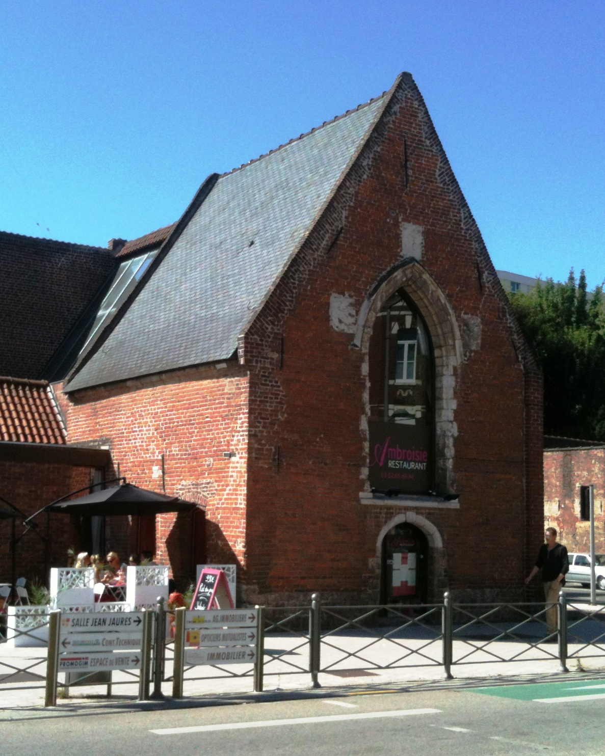 Ancienne maladrerie, 253 avenue de Dunkerque, inscrit comme monument historique en 1982.